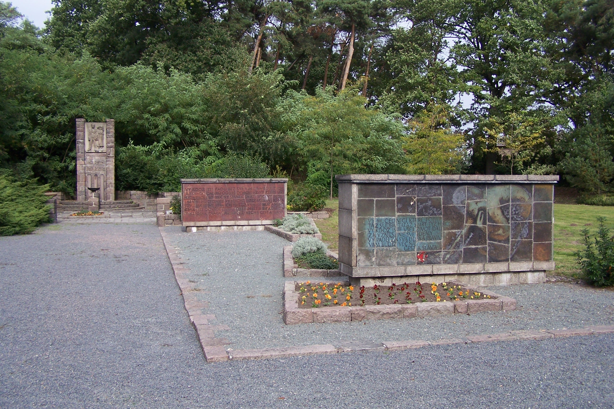 Pomník.